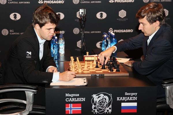 Карлсен - Карякин, 10 партия